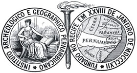 Logo do IAHGP